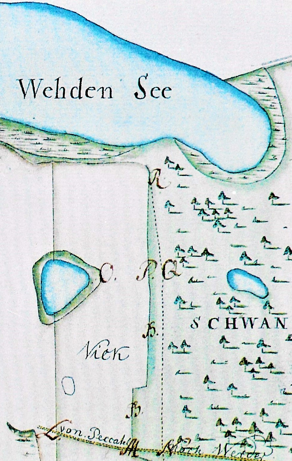 Wehden See um 1766, Ausschnitt eines Protokolls um Grundstücksstreitigkeiten des Guts Peccatel